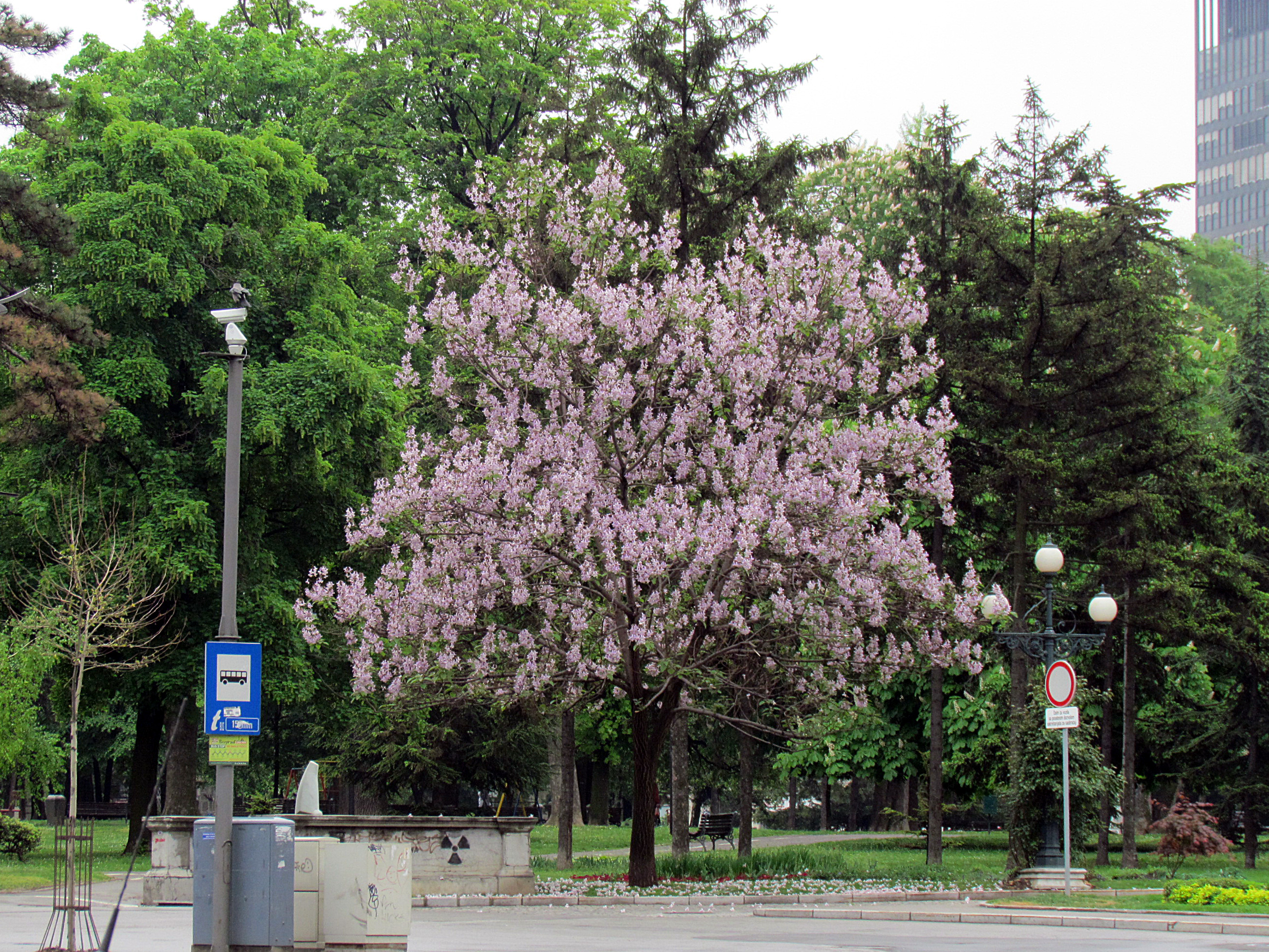 Paulownia tomentosa у Пионирском парку (аутор: Михаило Грбић)